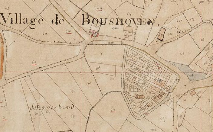 Percelen Boshoverschans, Weert